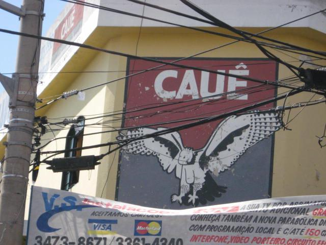 Loja Cauê, localizada no bairro Coqueiros, Belo Horizonte, Minas Gerais, Brasil